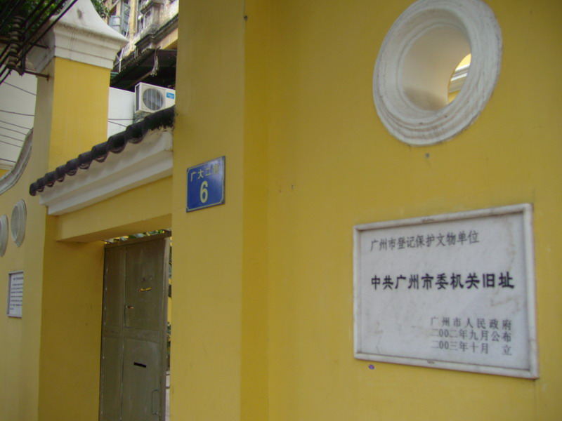 中文（中国大陆）: 中共广州市委机关旧址